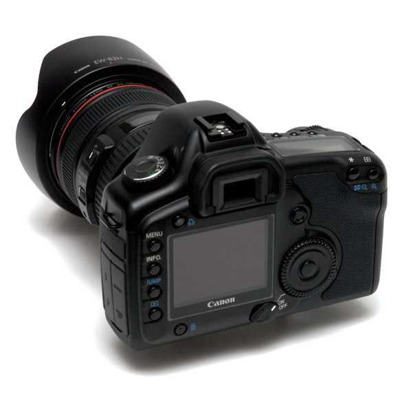 Appareil photo reflex numérique Canon EOS 5D (de dos)